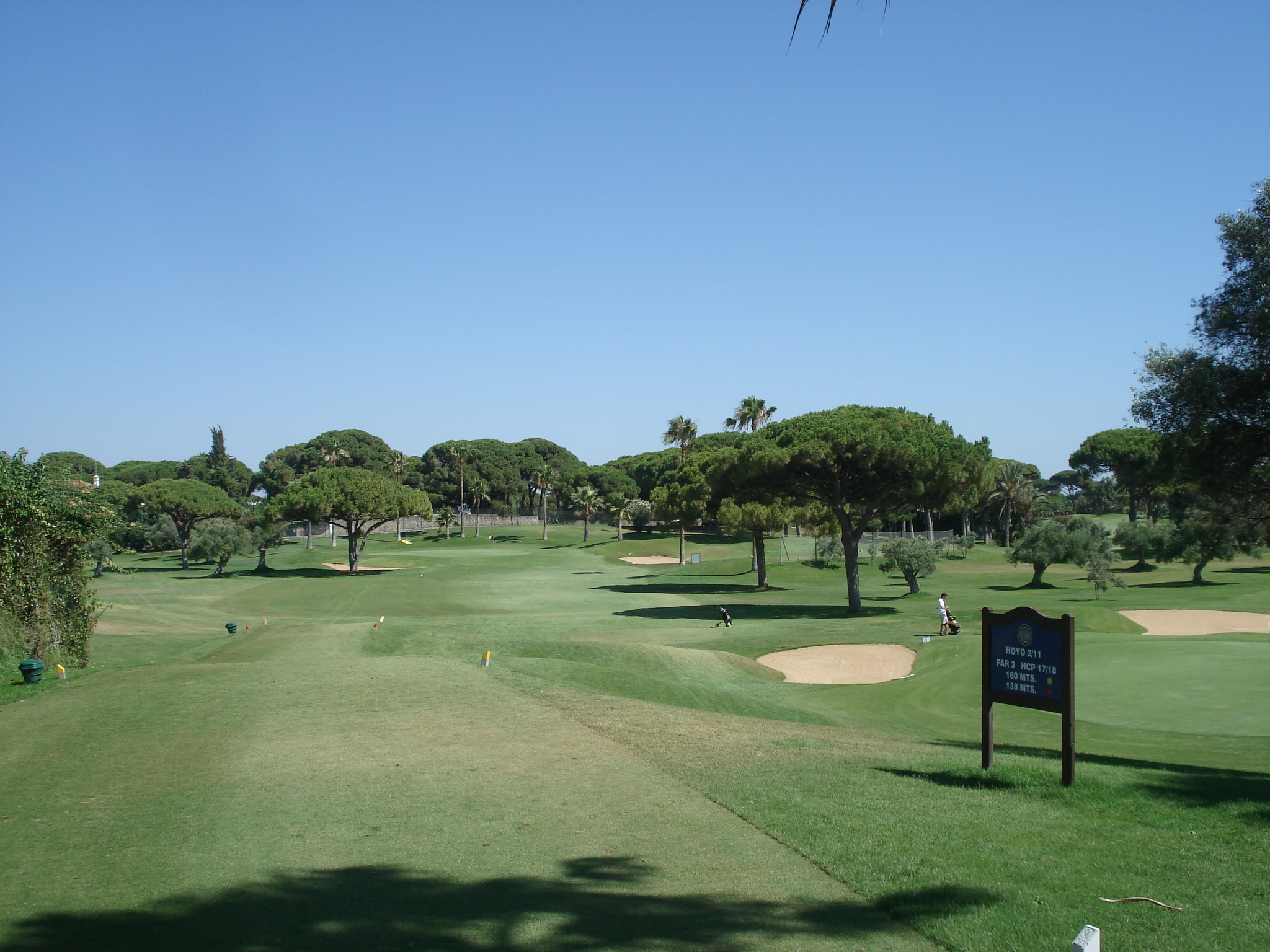 Vistahermosa Club de Golf, El Puerto de Santa María (Andalucía, España)